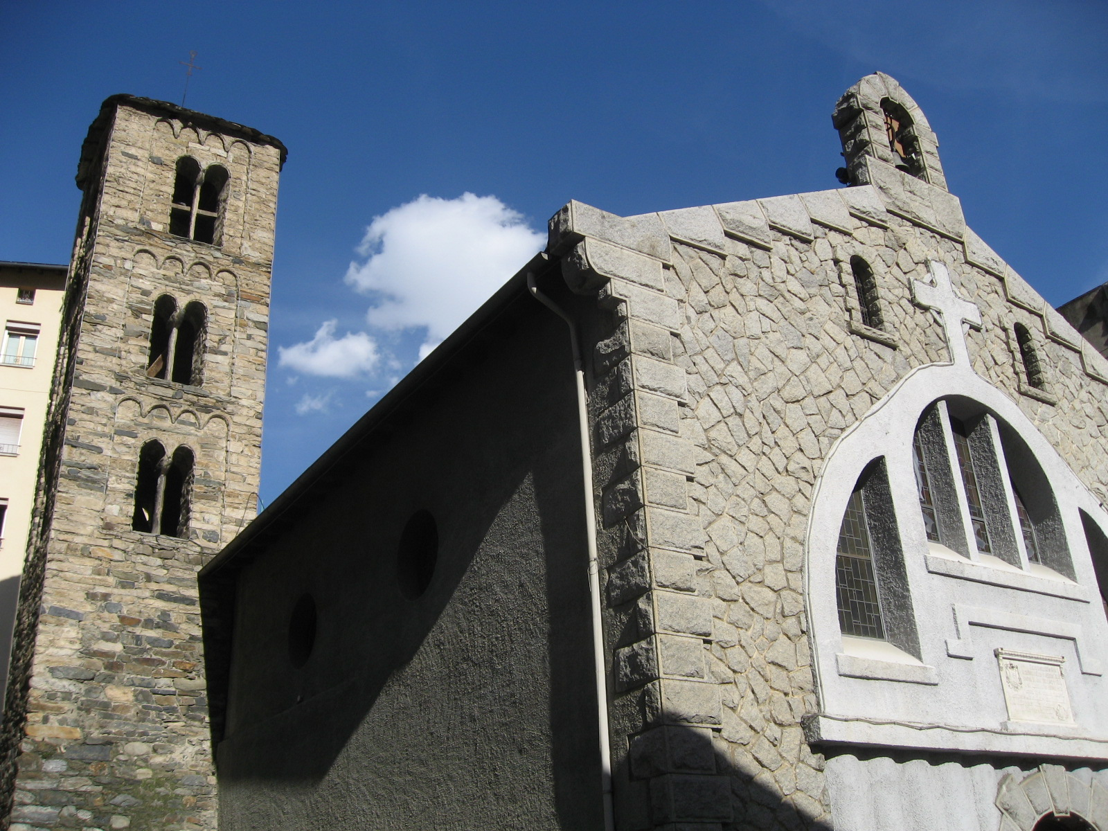 Church: Sant Julià i Sant Germà